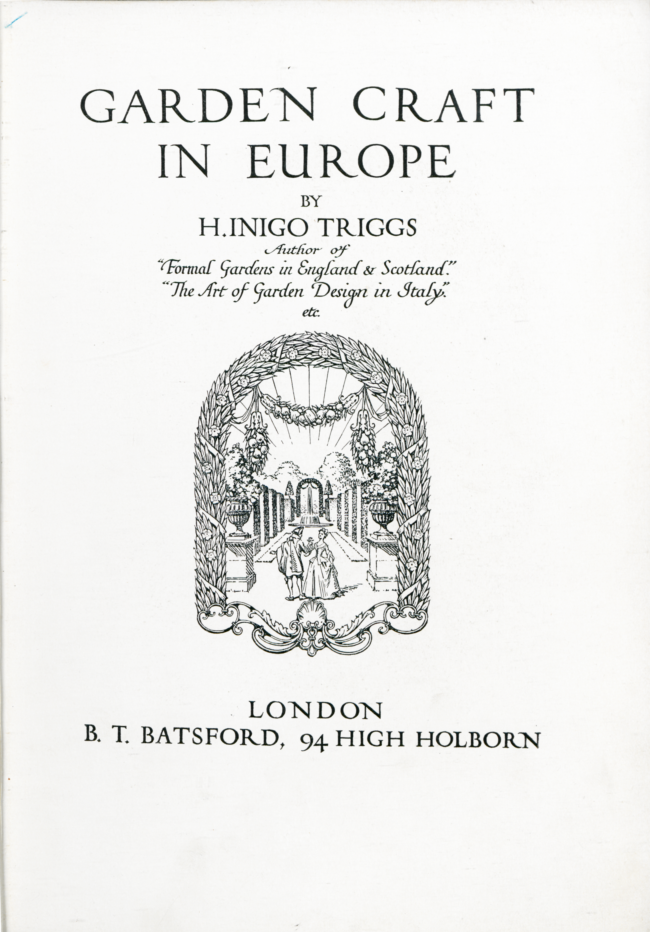 Titelseite von Garden craft in Europe. London 1913